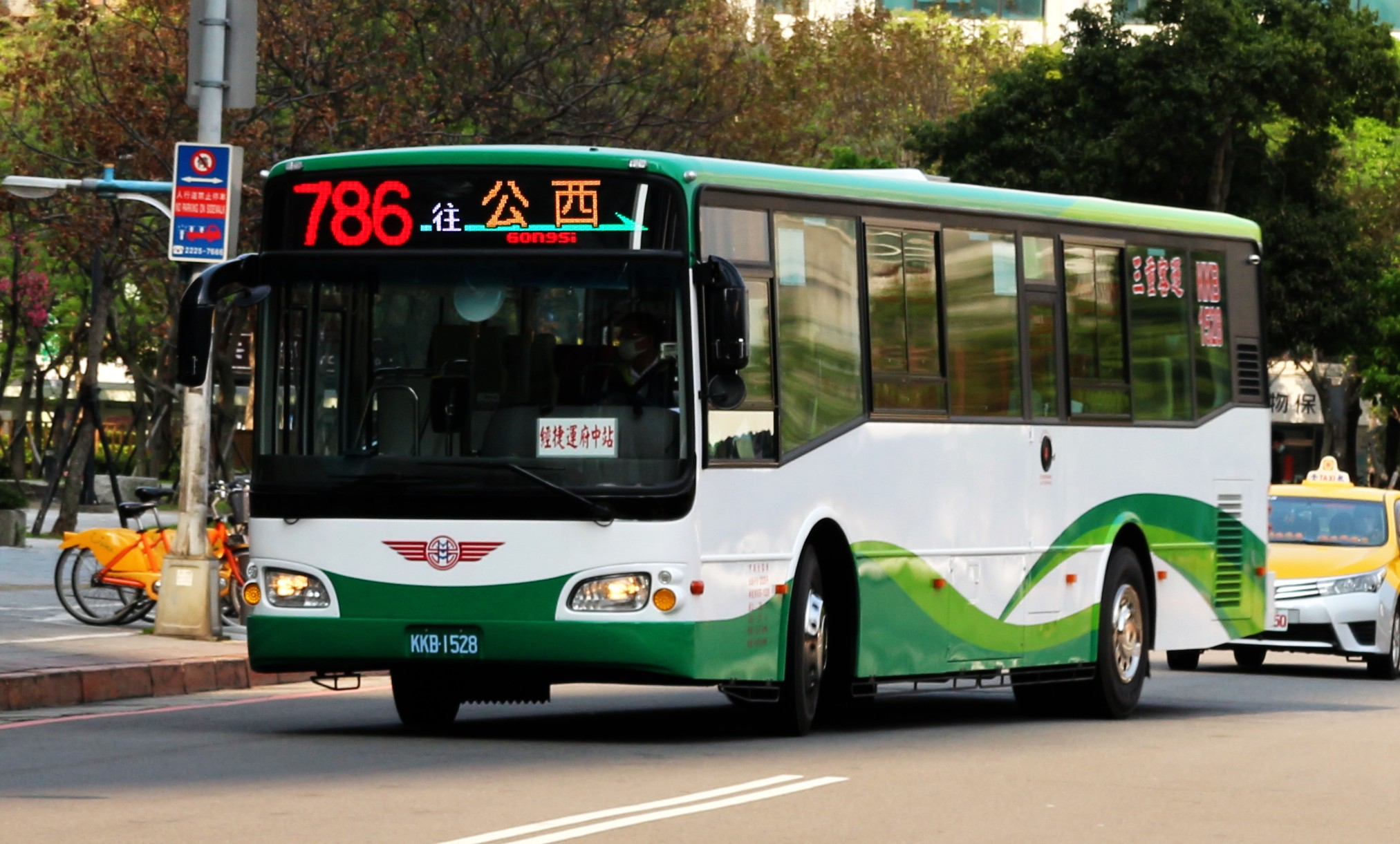 三重客運 2020 HINO RK8JRVA-KJF KKB-1528 786